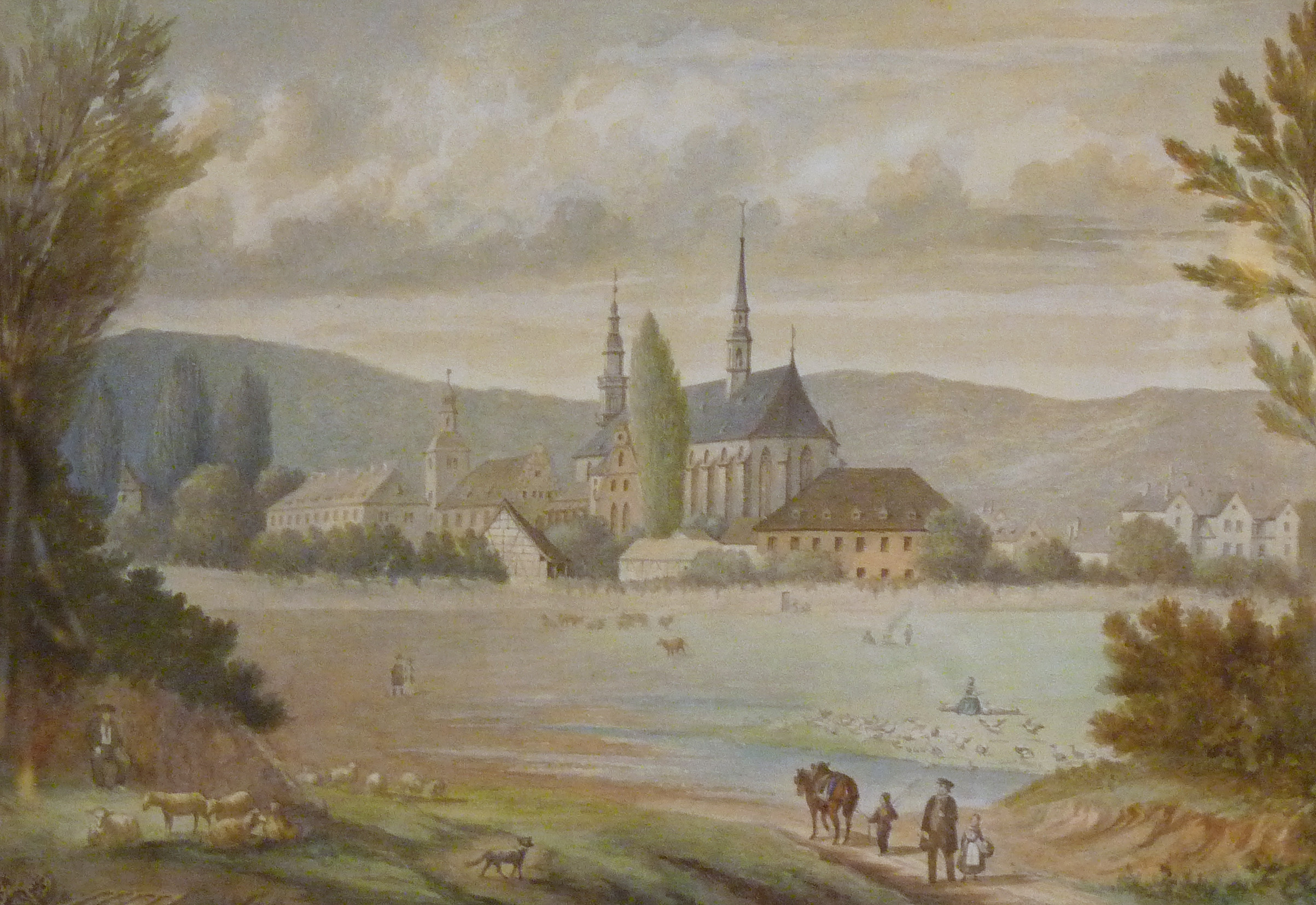 Vue de Molsheim, aquarelle de Kart, vers 1830. Chartreuse de Molsheim